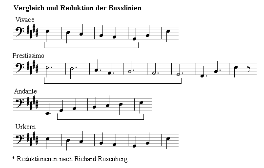 Vergleich der Basslinien von Beethovens Op. 109 nach Richard Rosenberg